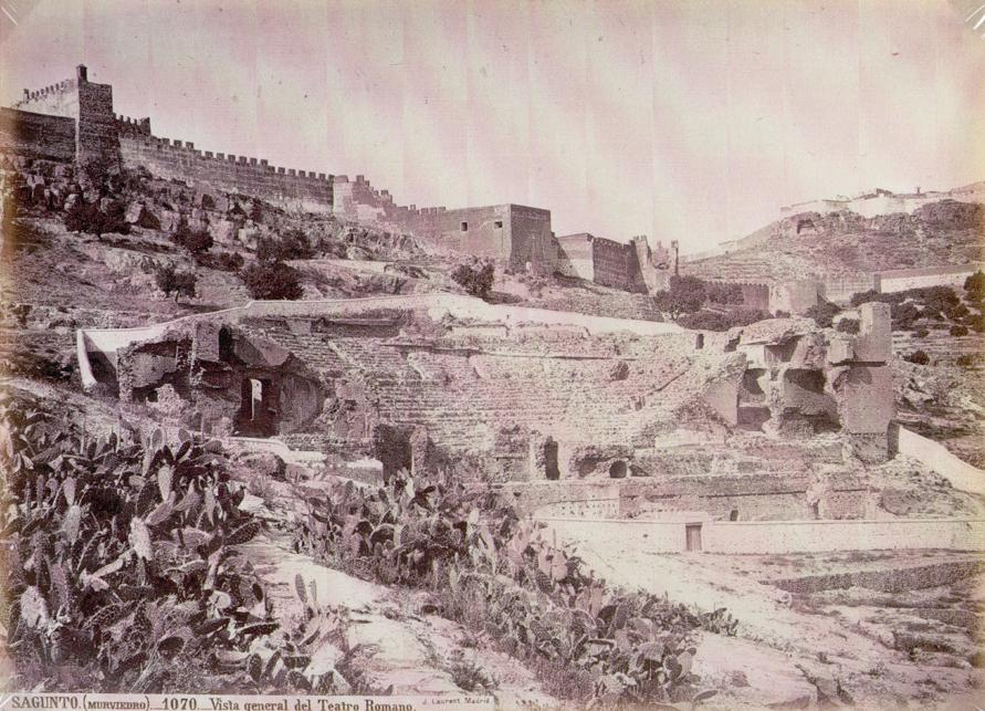 "Vista general del Teatre Romà", fotografia treta per J. Laurent (1816-1886).